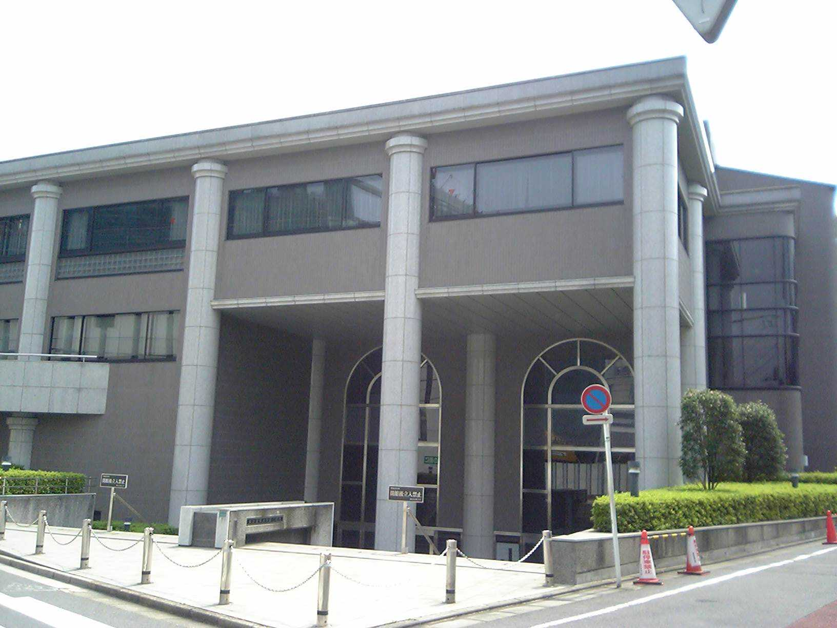 東京音楽大学